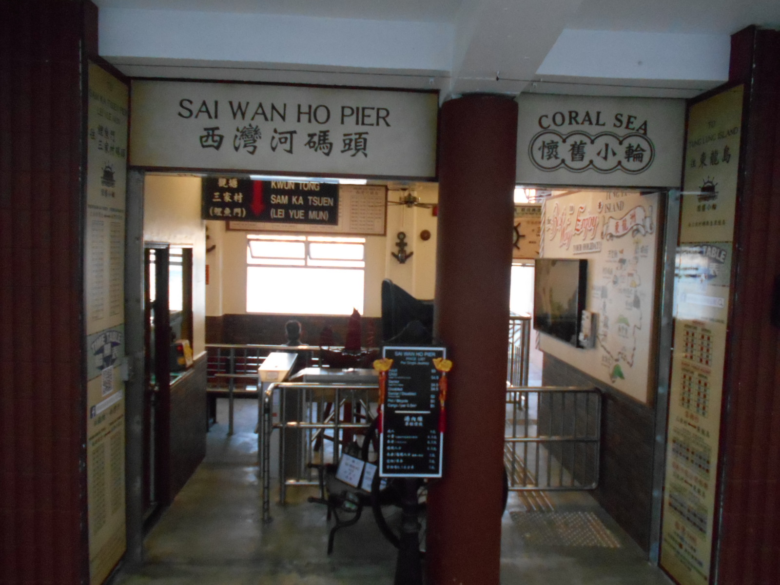 中文（香港）: 翻新後的西灣河碼頭的出入口，甚有懷舊色彩(2017年1月)